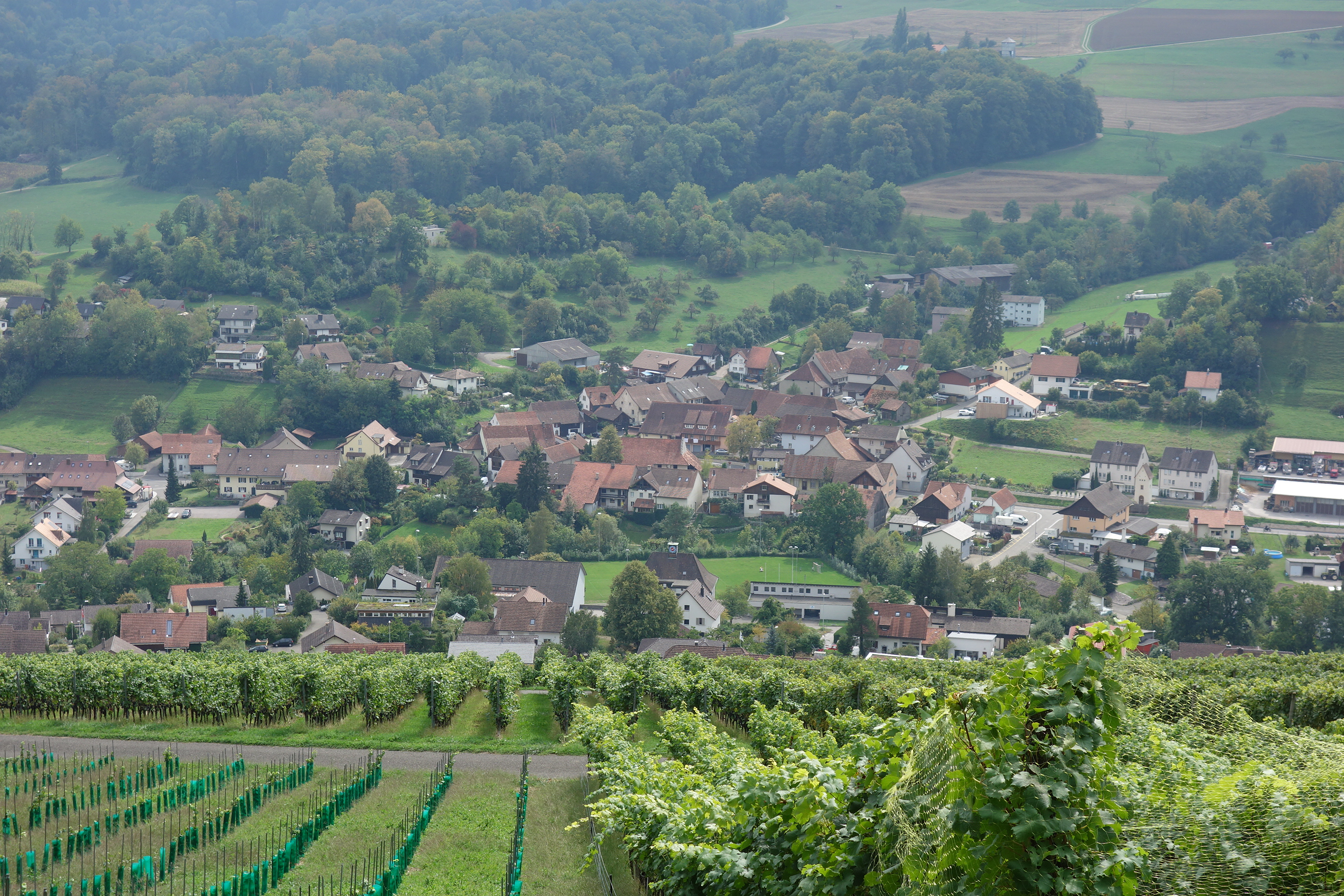 Oberflachs AG, Schweiz